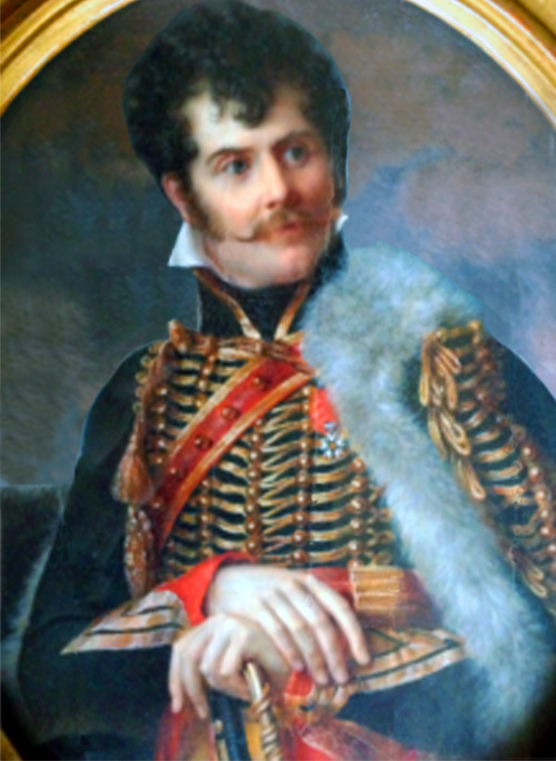 Général Bro, Miniature de Jacques Augustion (coll. Particulière) Image retouchée